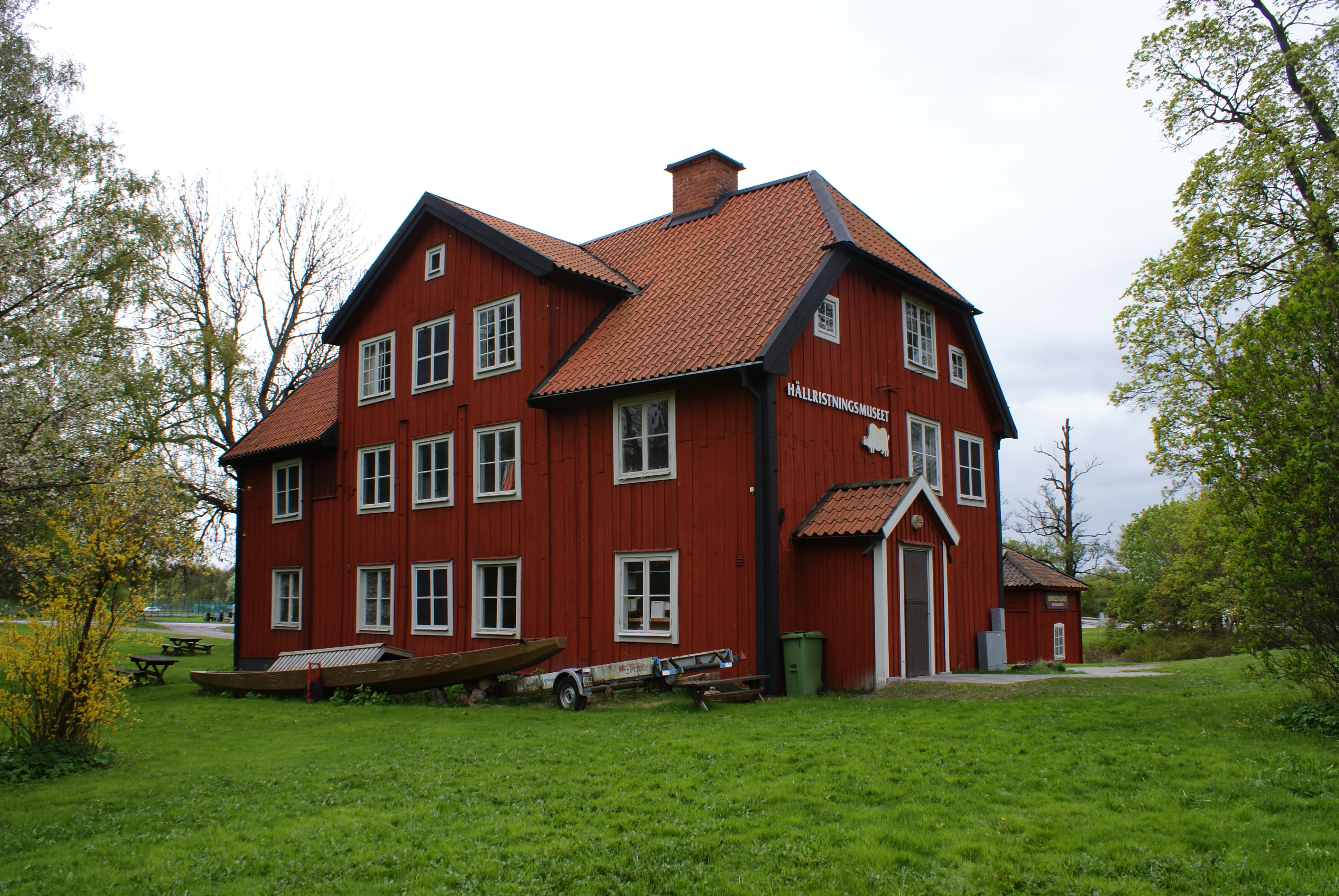 NORRKÖPING HIMMELSTADLUND 1:1 - husnr 6 (brunnshotellet) in Norrköping